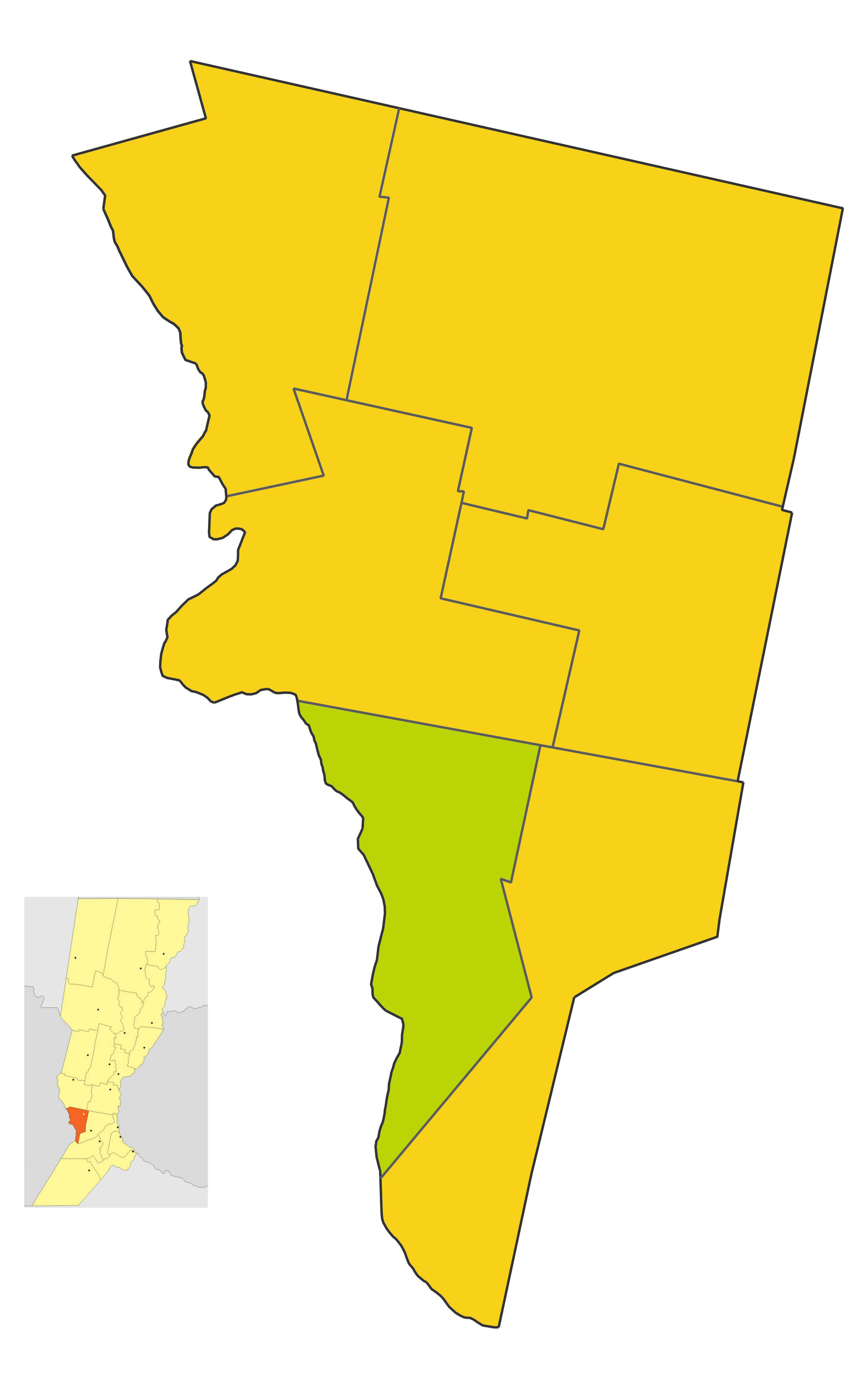 Map of the comuna de Tortugas in Belgrano department, Santa Fe province, Argentina